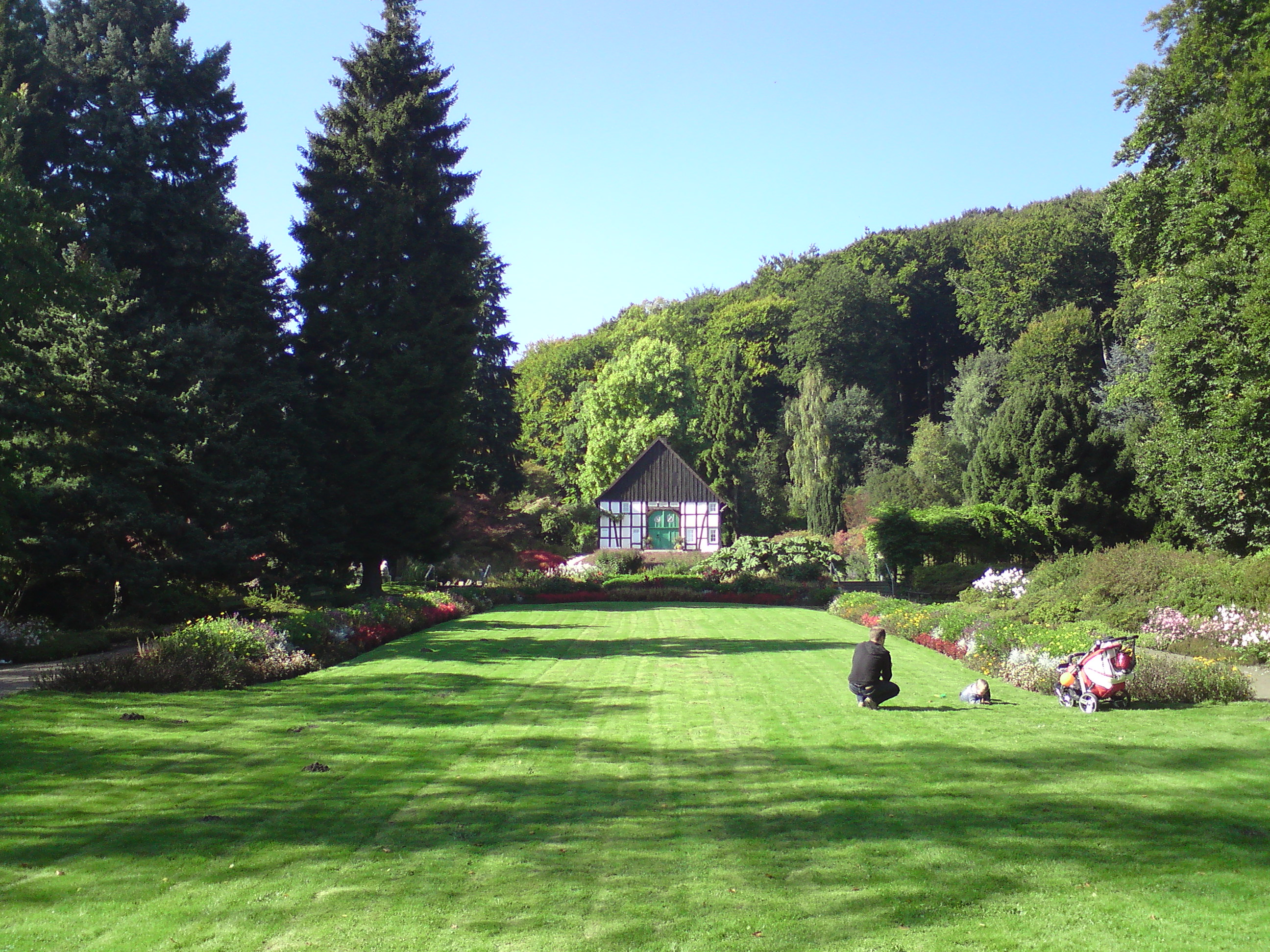 Eingangsbereich des Botanischen Gartens Bielefeld